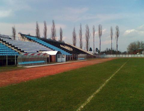 Stadionul echipei CS Kosarom Pascani.